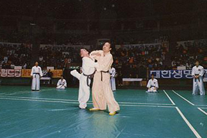 Kuksanim Myung Jae Nam em demonstração de Hankido